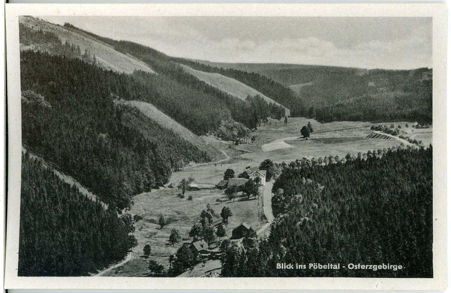 Pöbeltal; Blick ins Pöbeltal This postcard is from publisher Brück & Sohn in Meißen ( postcard has a unique number 27976 and is available in a higher resolution at the publisher. This images was uploaded in a cooperation project between Wikipedians and the publisher.